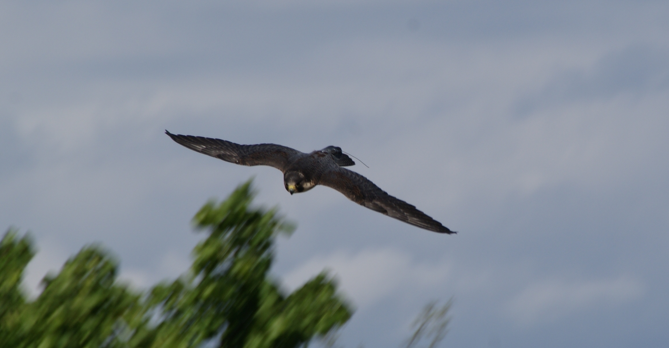 Faucon pélerin (Falco peregrinus)